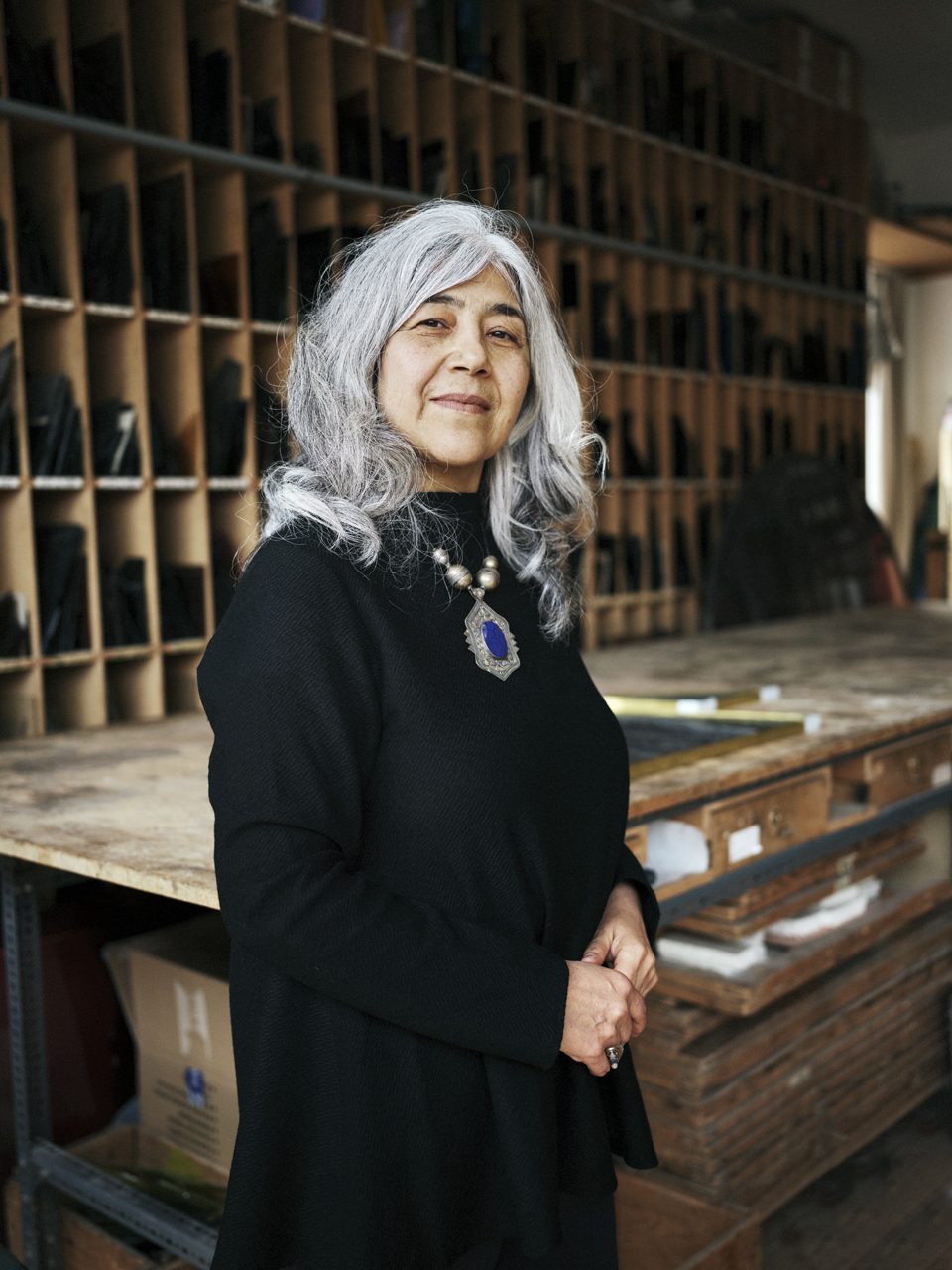 Mahbuba Maqsoodi, 2020 Foto von Dieter Mayr